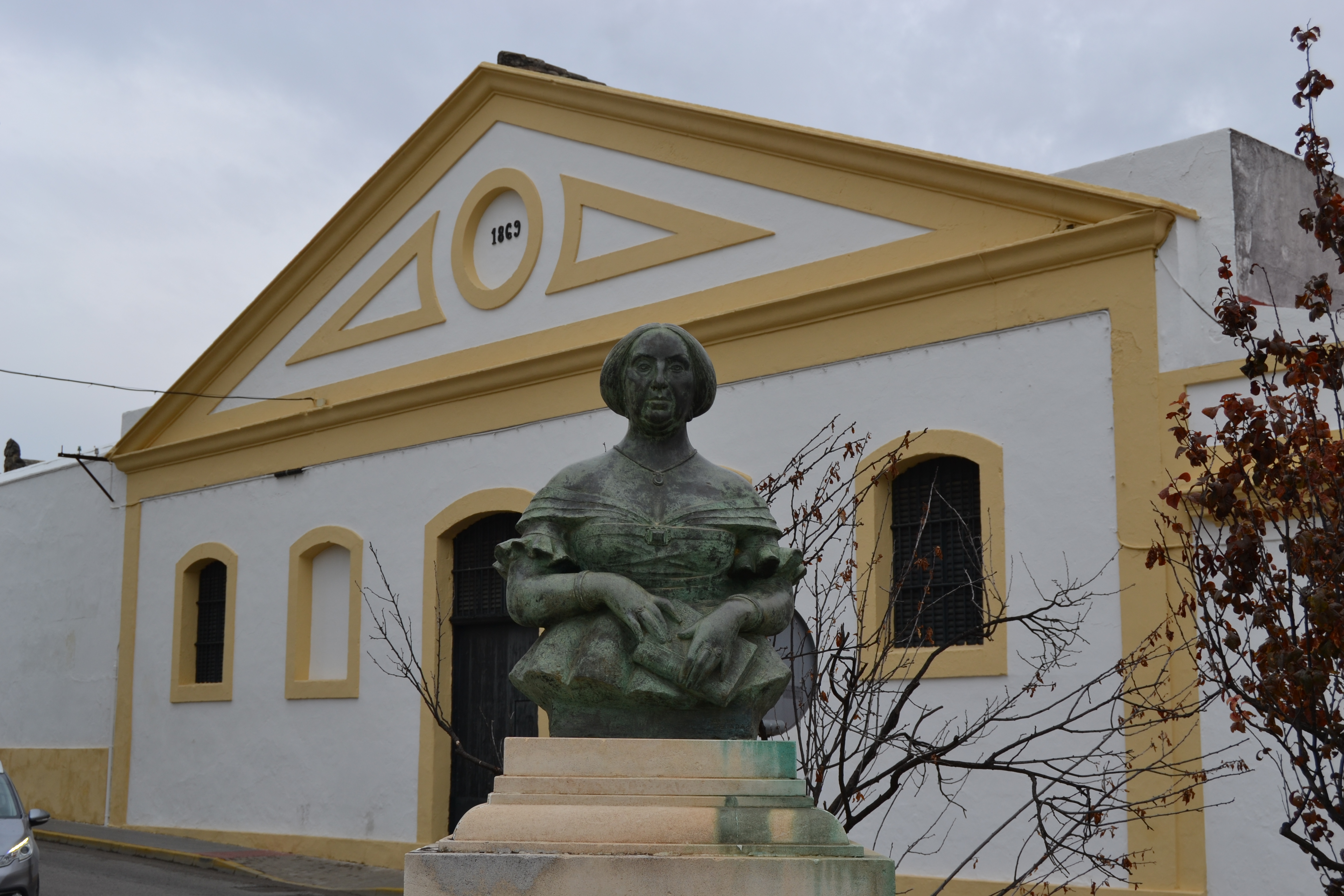 El Puerto de Santa María, Andalucía, España